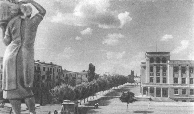 Imagine din oraşul Tiraspol